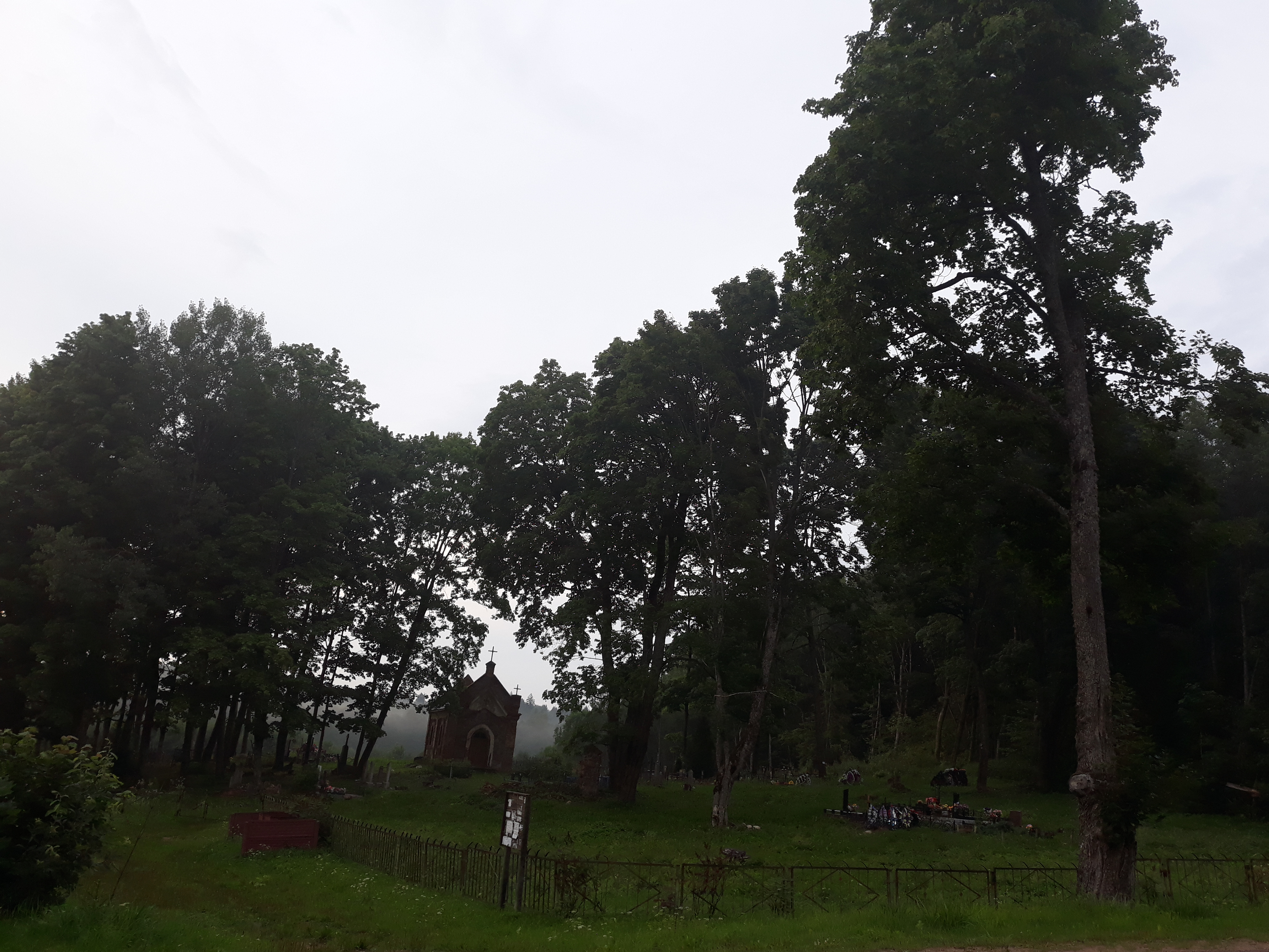 Краявіды